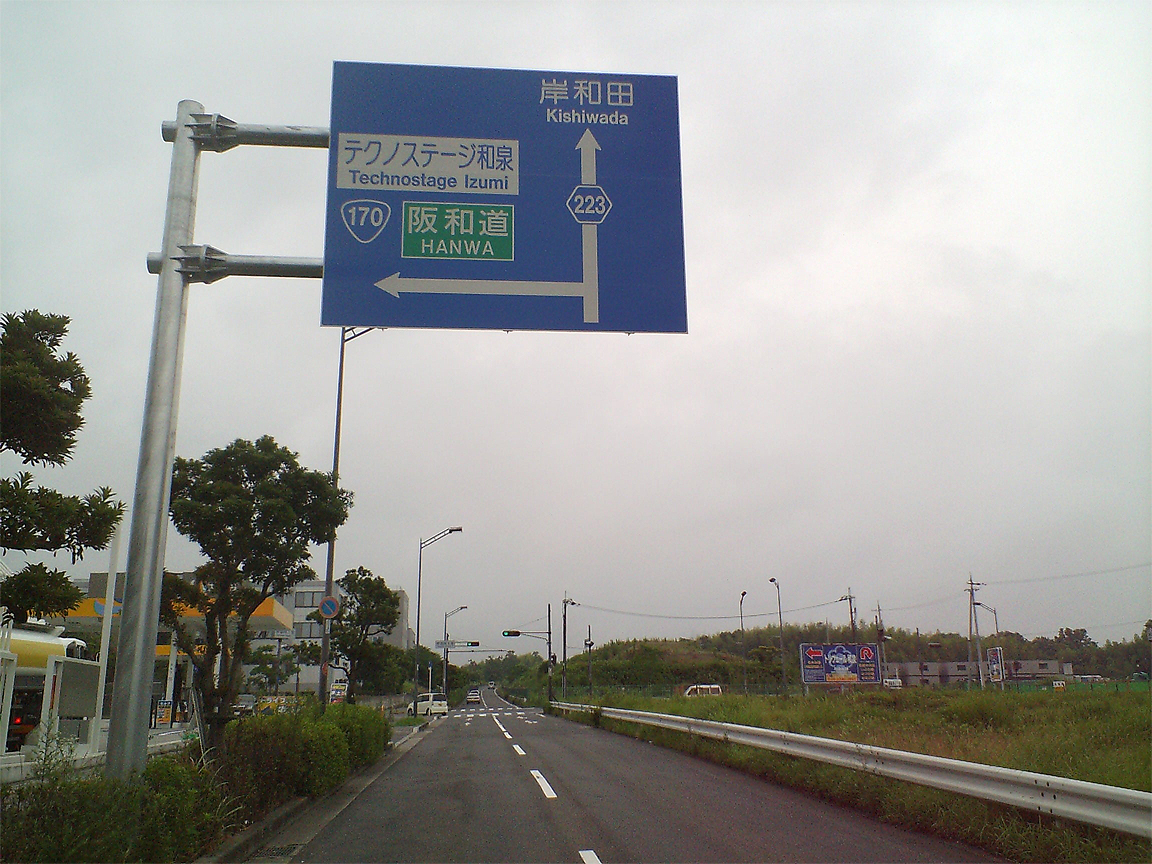 投稿者自身が大阪府和泉市内の自動車道のひとつである『大阪府道223号三林岡山線』を撮影。